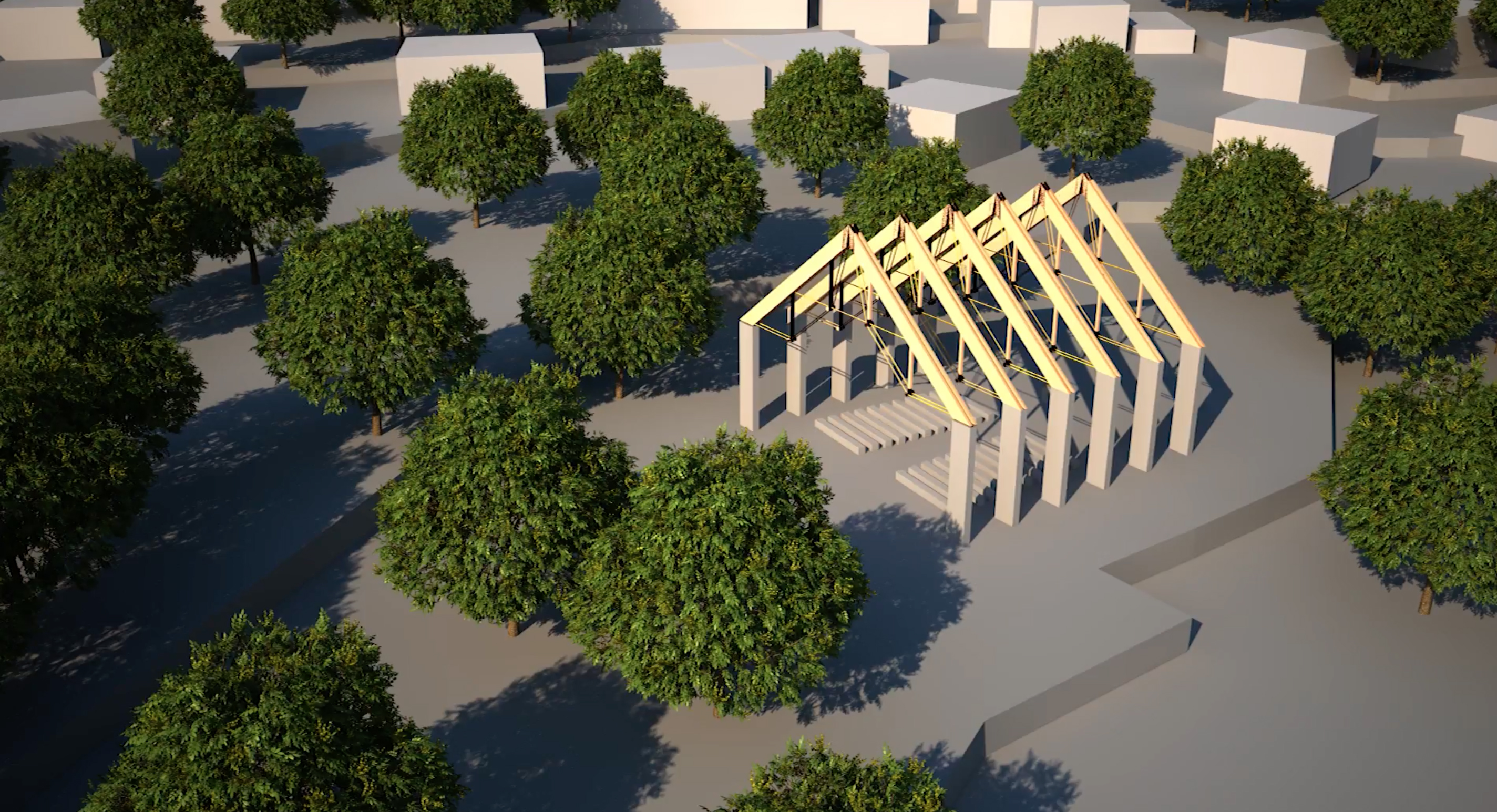 Dieses Bild zeigt eine 3D-Animation der Tragstruktur von St. Benedikt zu Regensburg.